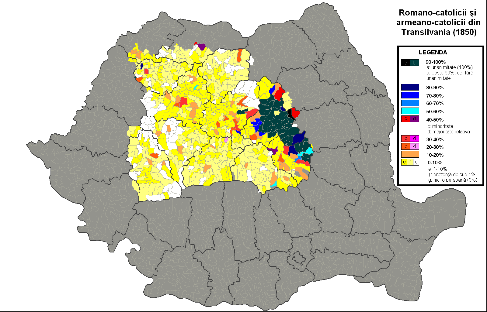 Romano-catolicii din Principatul Transilvaniei (1850).